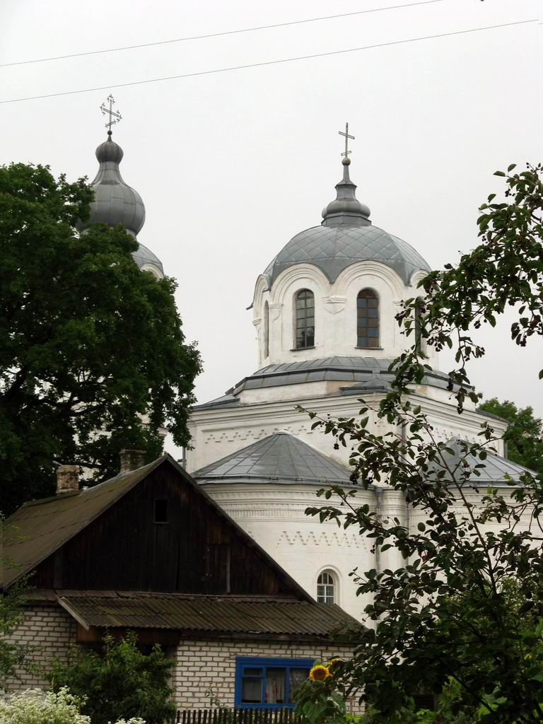 Беларуская (тарашкевіца): Дзісна